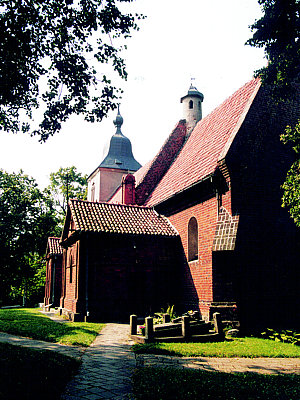 Gruta - rzymskokatolicki kościół parafialny p.w. Wniebowzięcia NMP, XIV, 1670